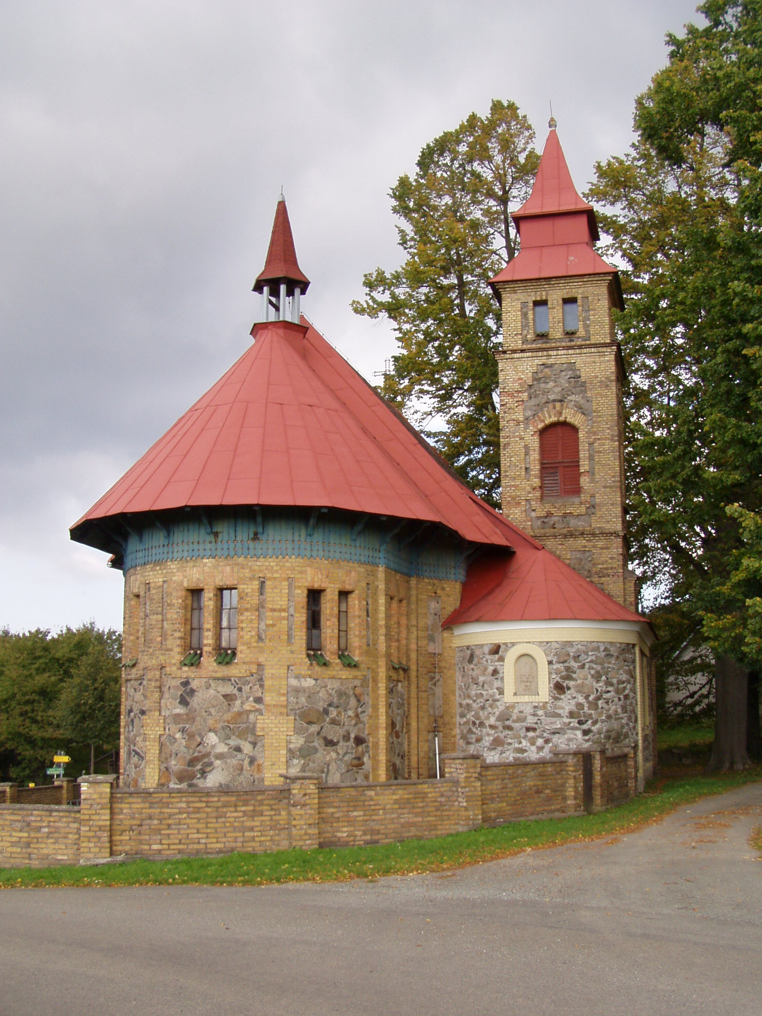 Kostel sv. Josefa na Šedivinách